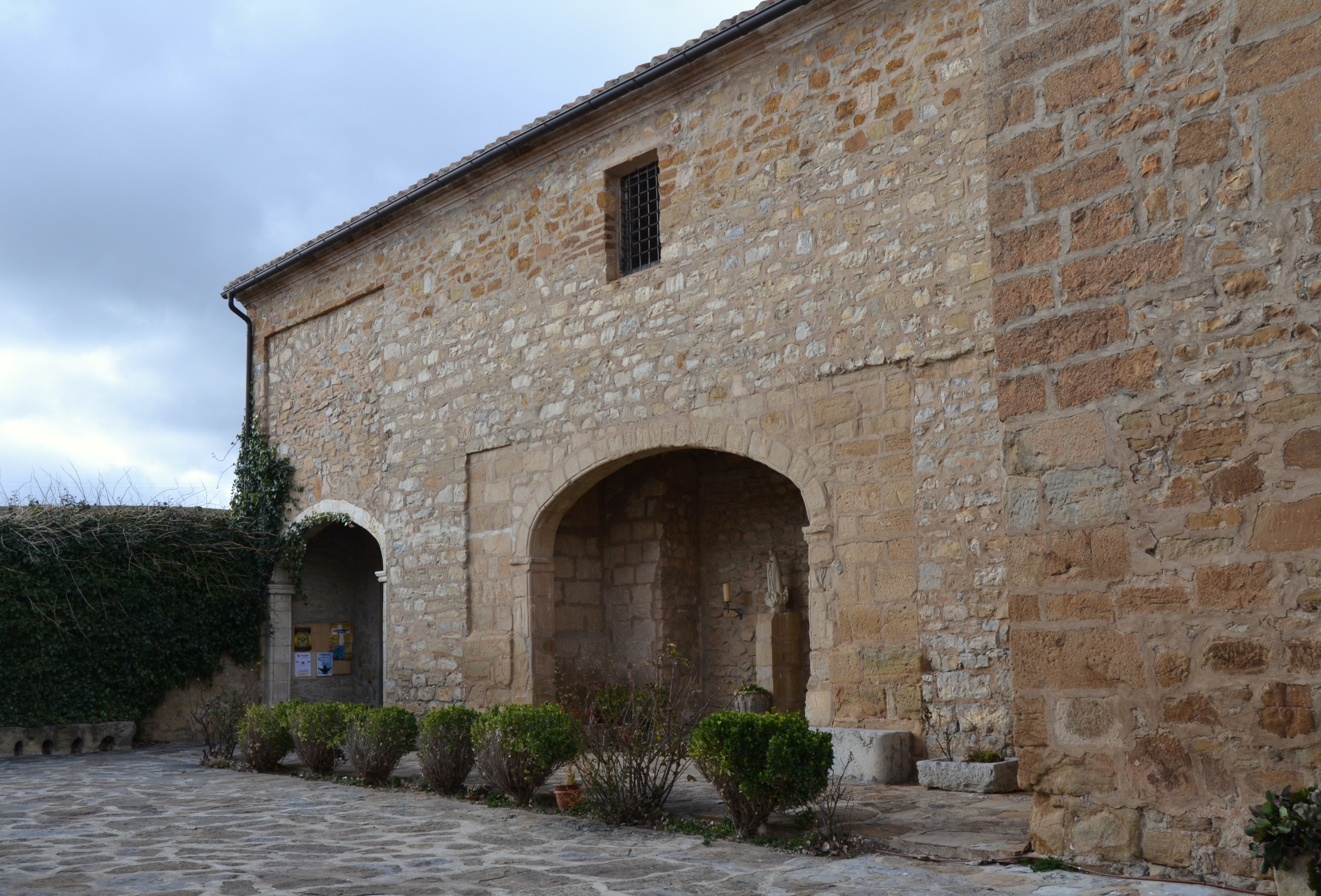 Església de sant Pere de Barracas, lateral.